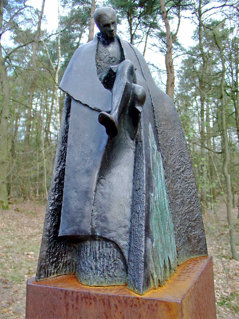 Standbeeld ter gedachtenis aan de bioloog Victor Westhoff door Willem van der Velden in het Onland in het natuurgebied Springendal in de gemeente Tubbergen